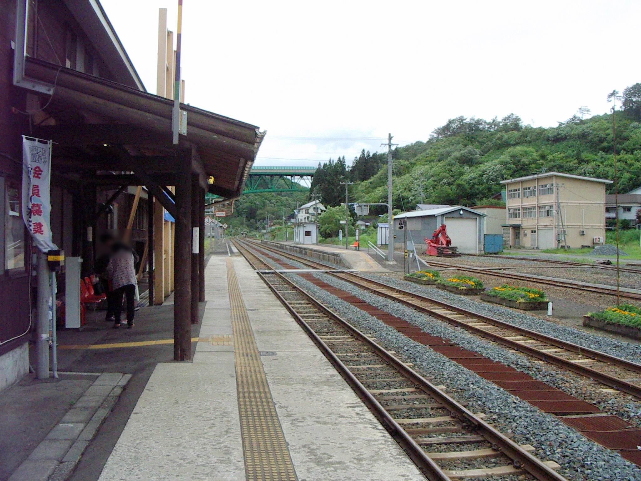 北上線ほっとゆだ駅